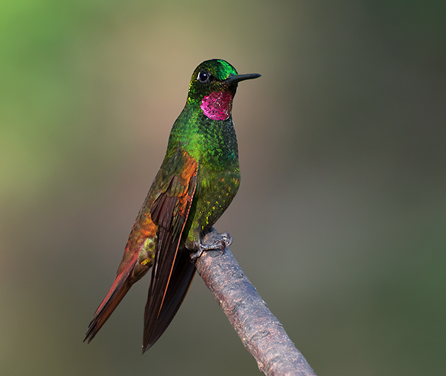 Trilha dos Tucanos - Tapirai-SP - Brasil